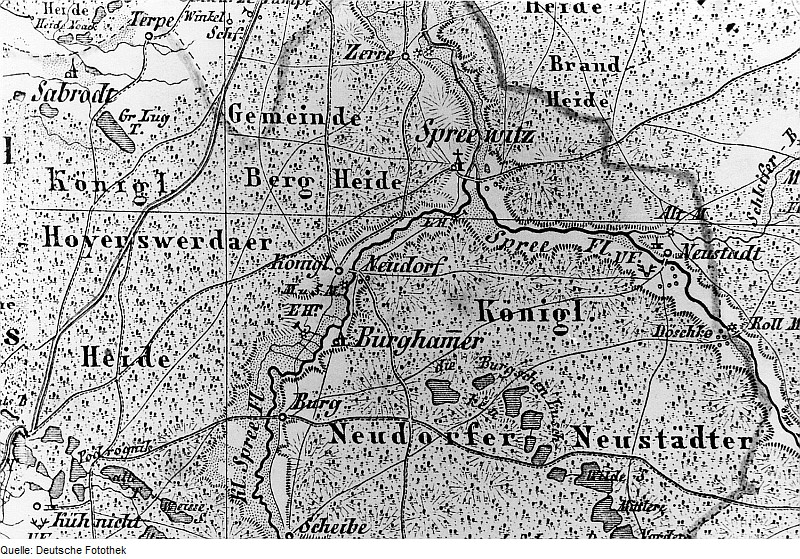 Original image description from the Deutsche Fotothek Spreetal-Spreewitz. Atlas von Schlesien, Kreis Hoyerswerda, Verlag C. Flemming/Glogau, um 1850